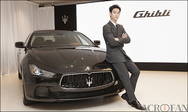 3세대 마세라티 기블리 한국 출시 발표회